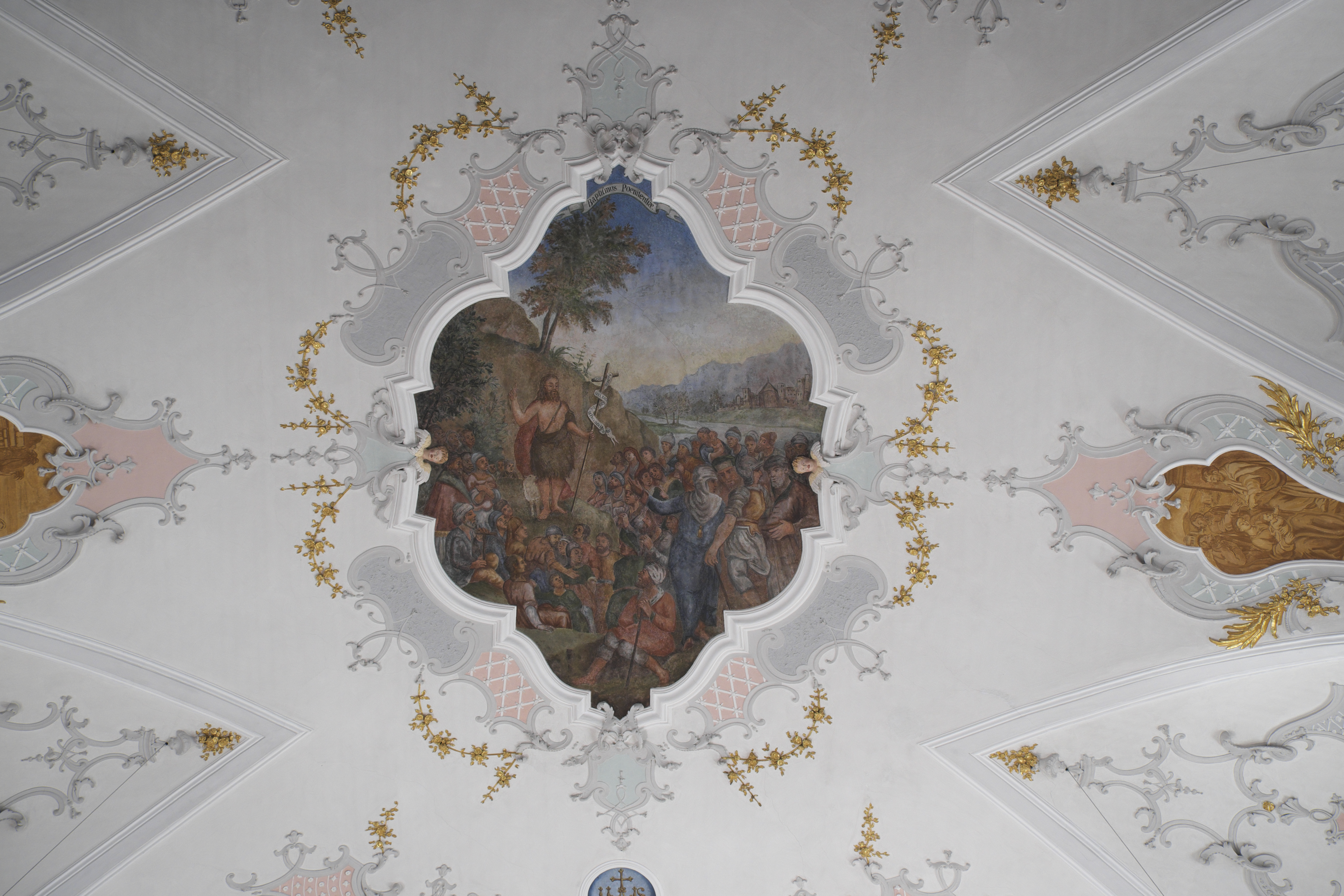 Katholische Pfarrkirche St. Johannes der Täufer in Stadl (Vilgertshofen) im oberbayerischen Landkreis Landsberg am Lech (Bayern/Deutschland), Fresken, vielleicht von Johann Baptist Baader, mehrmals übermalt, mit Szenen aus dem Leben Johannes des Täufers